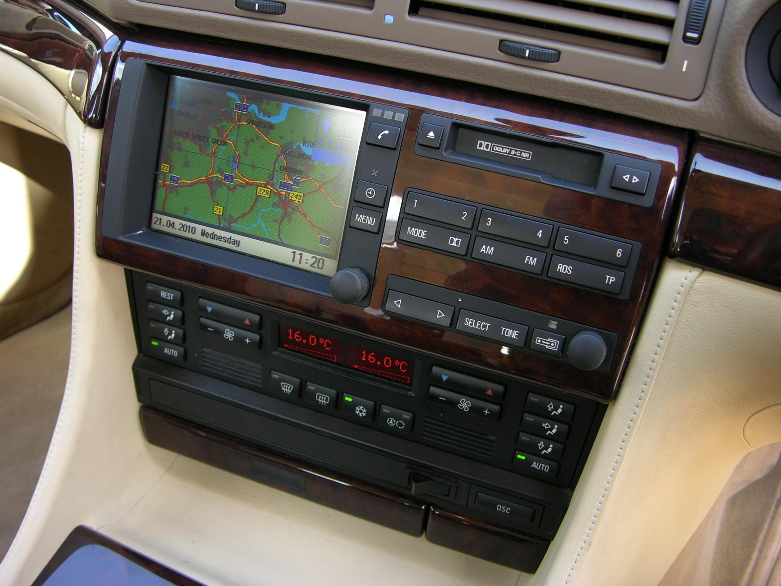 1998 BMW 740i Individual